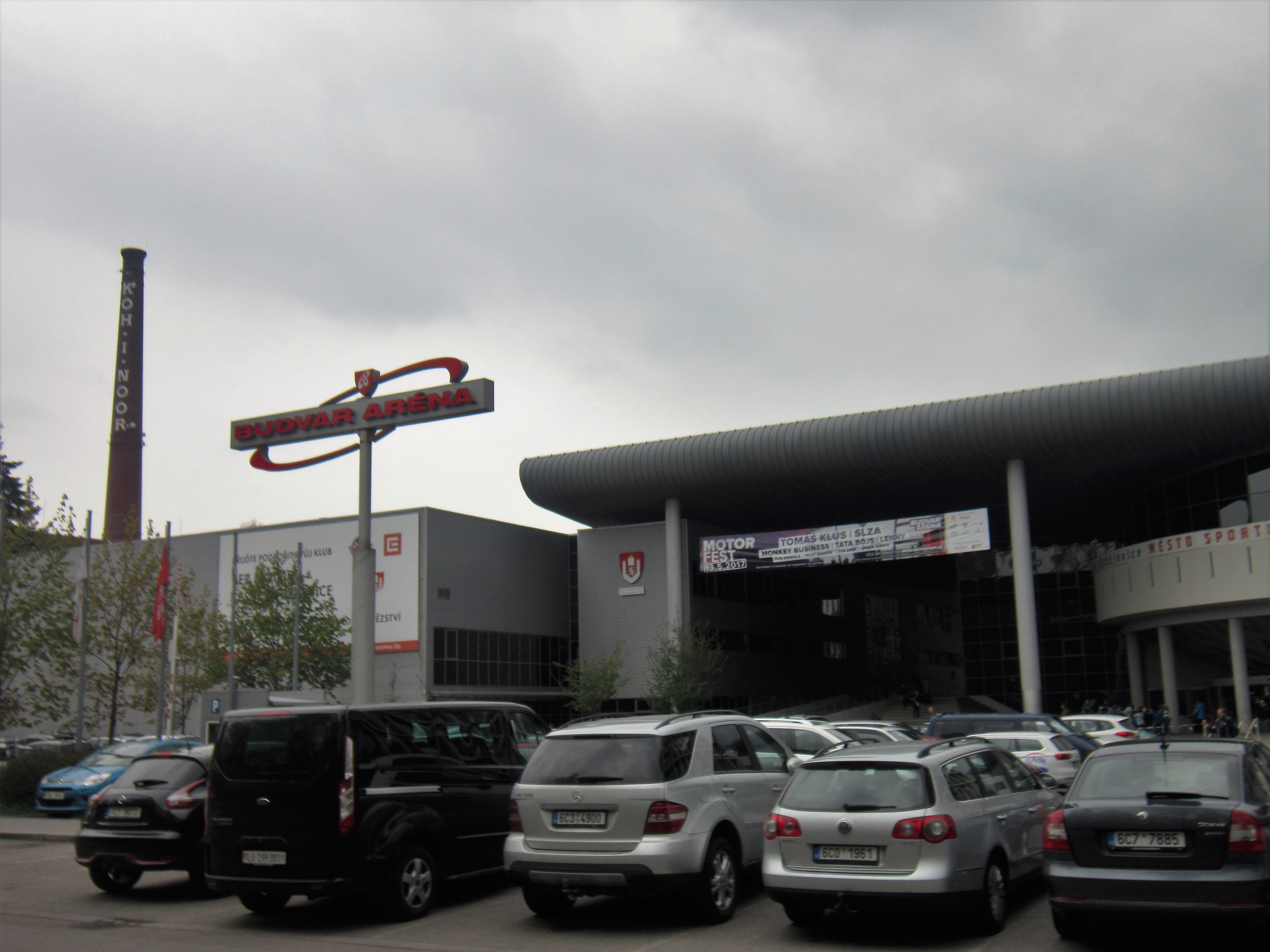 Budvar aréna od východu.